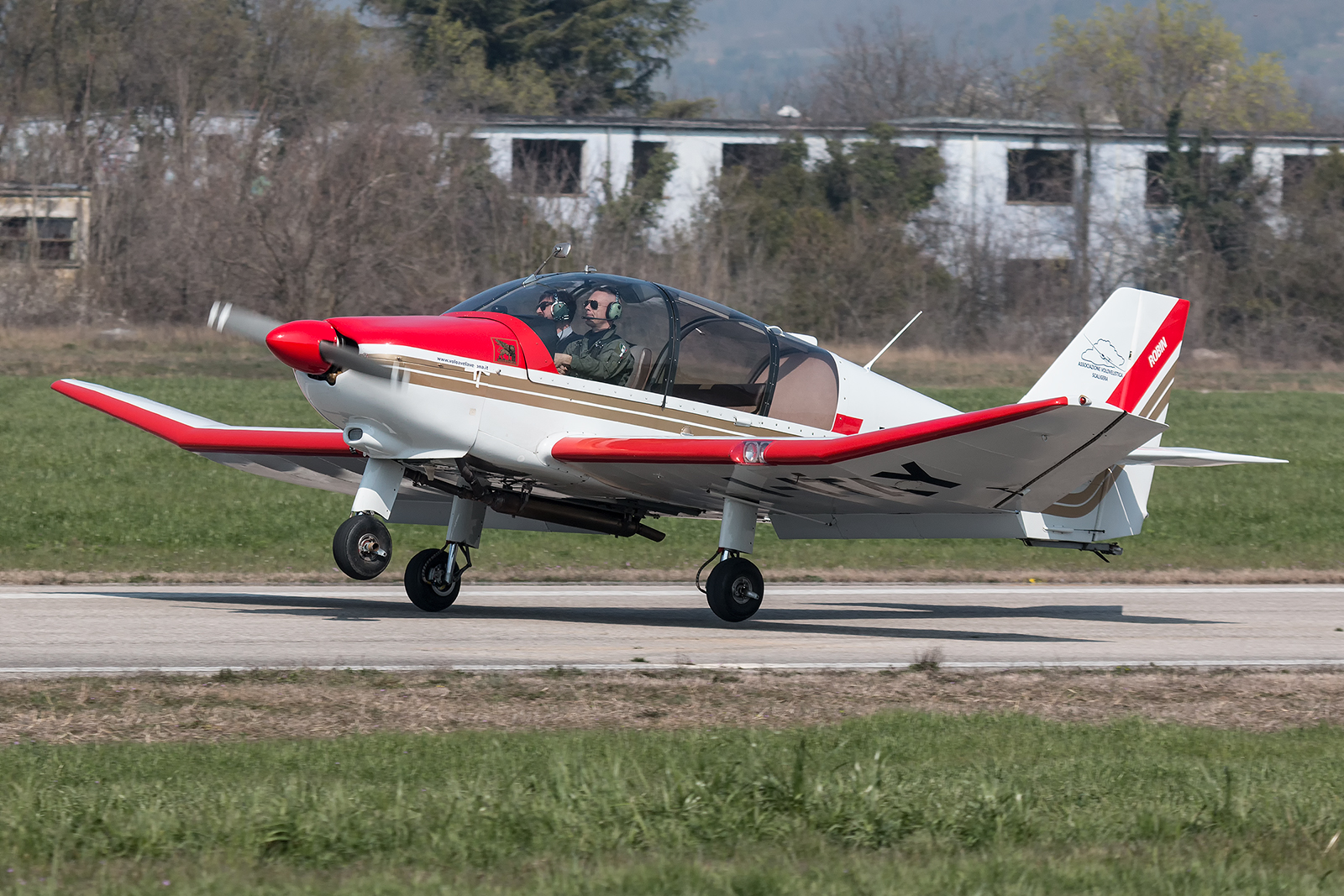 I-ITAY, il nuovo traino dell'Associazione Volo a Vela di Verona-Boscomantico